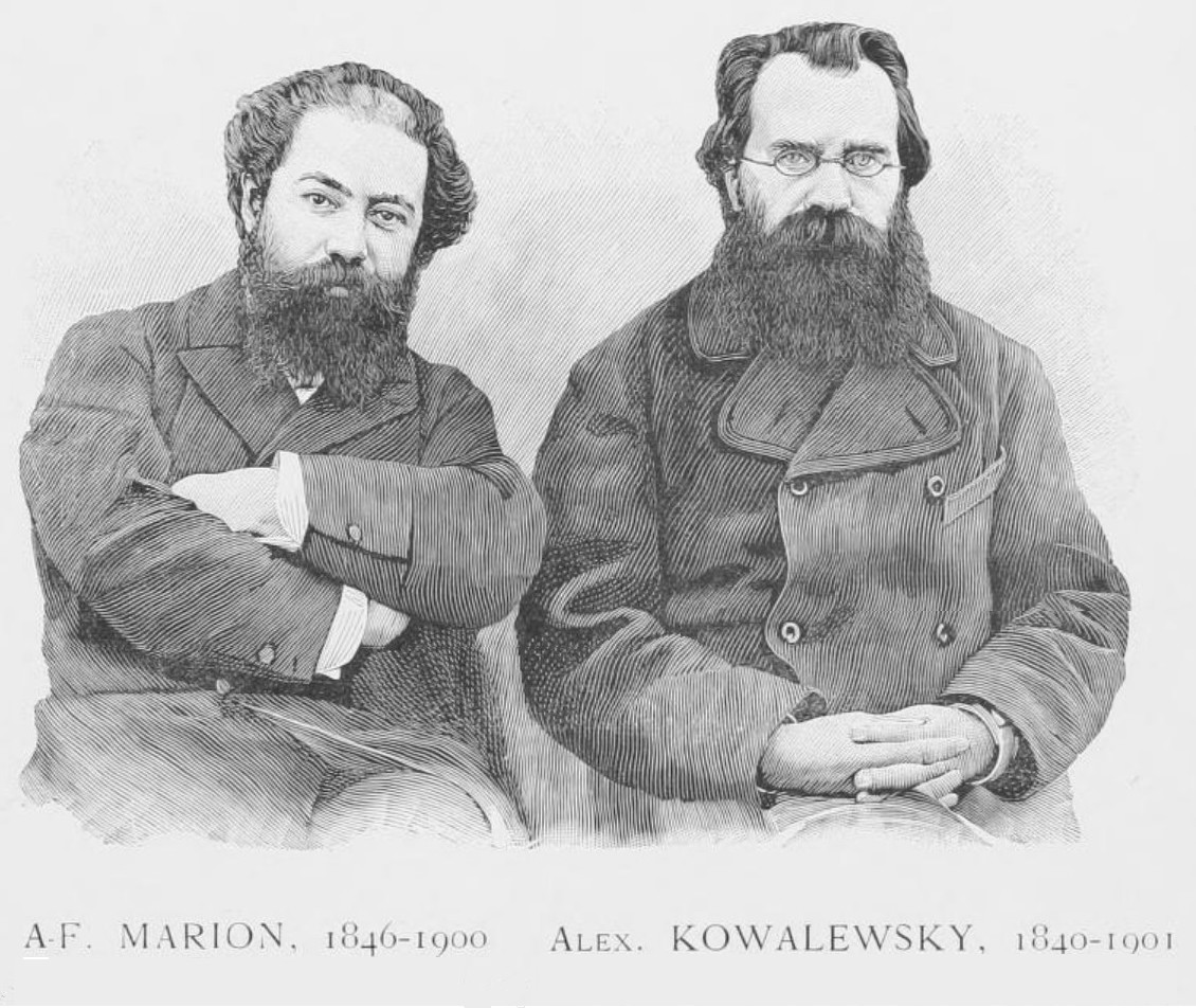 Antoine Fortuné Marion 1846-1900 et Alex Kowaleswsky 1840-1901